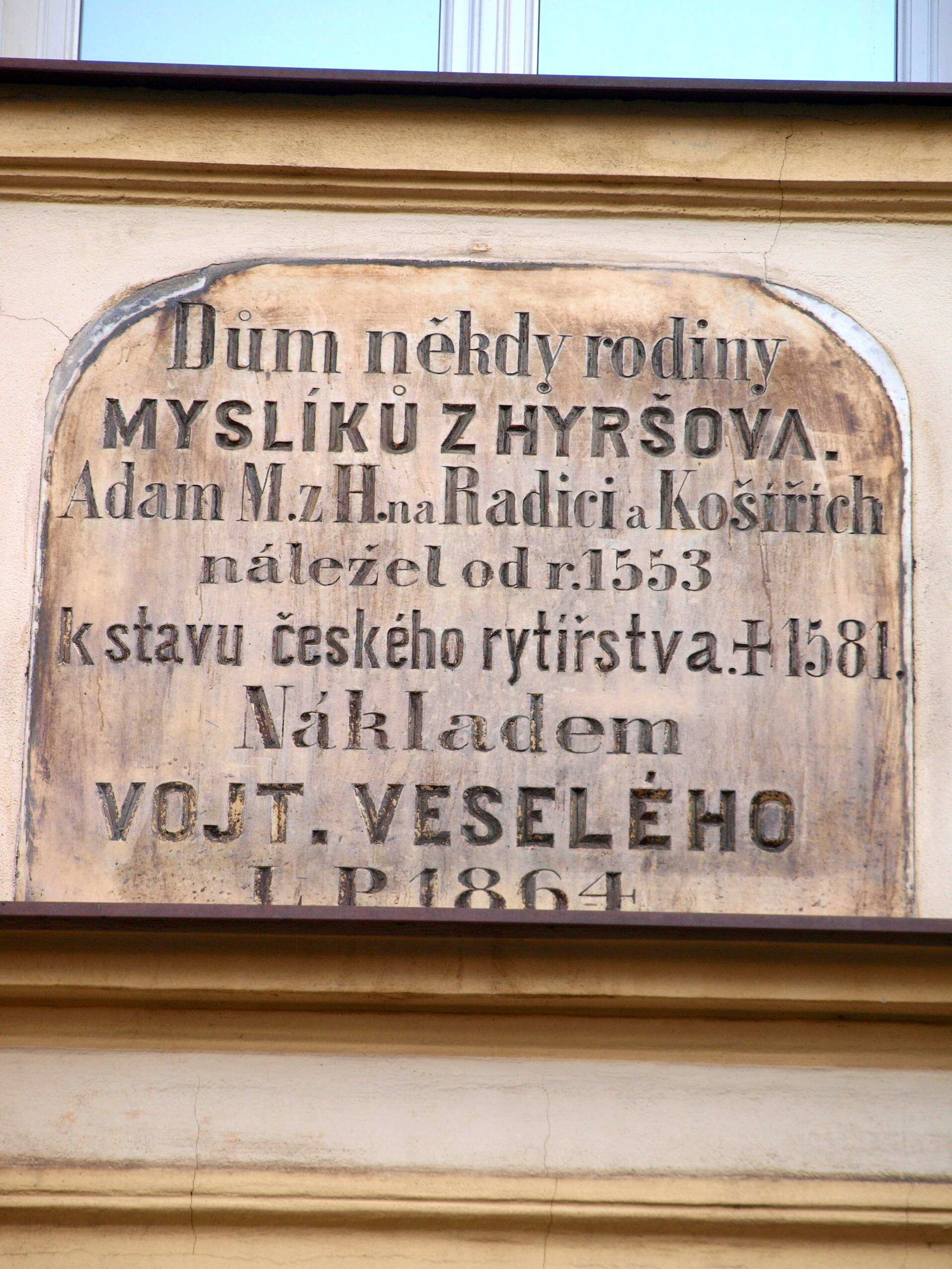 Myslíkova ulice